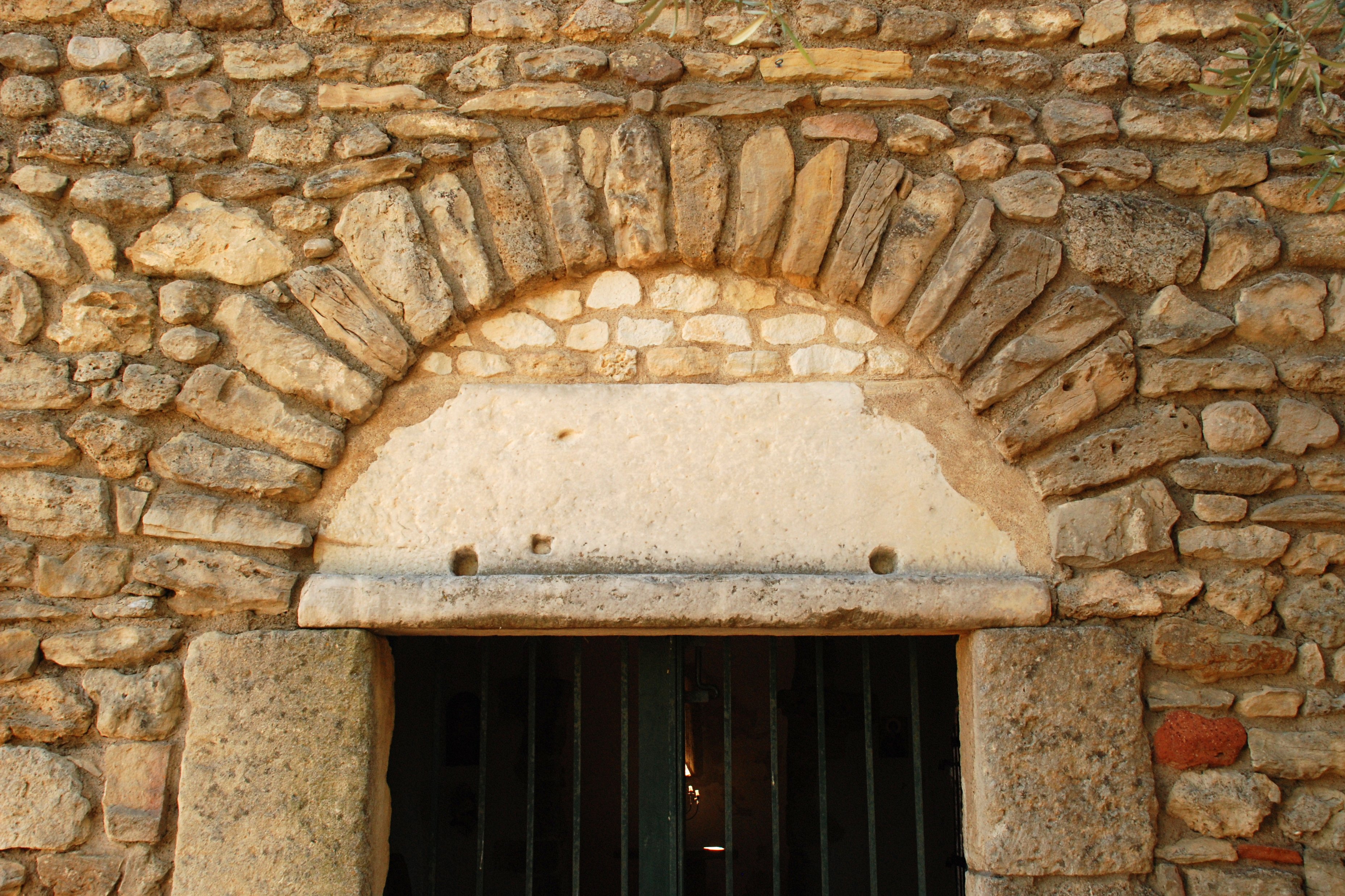 France - Languedoc - Aude - Moussan - chapelle Saint-Laurent (préroman) .